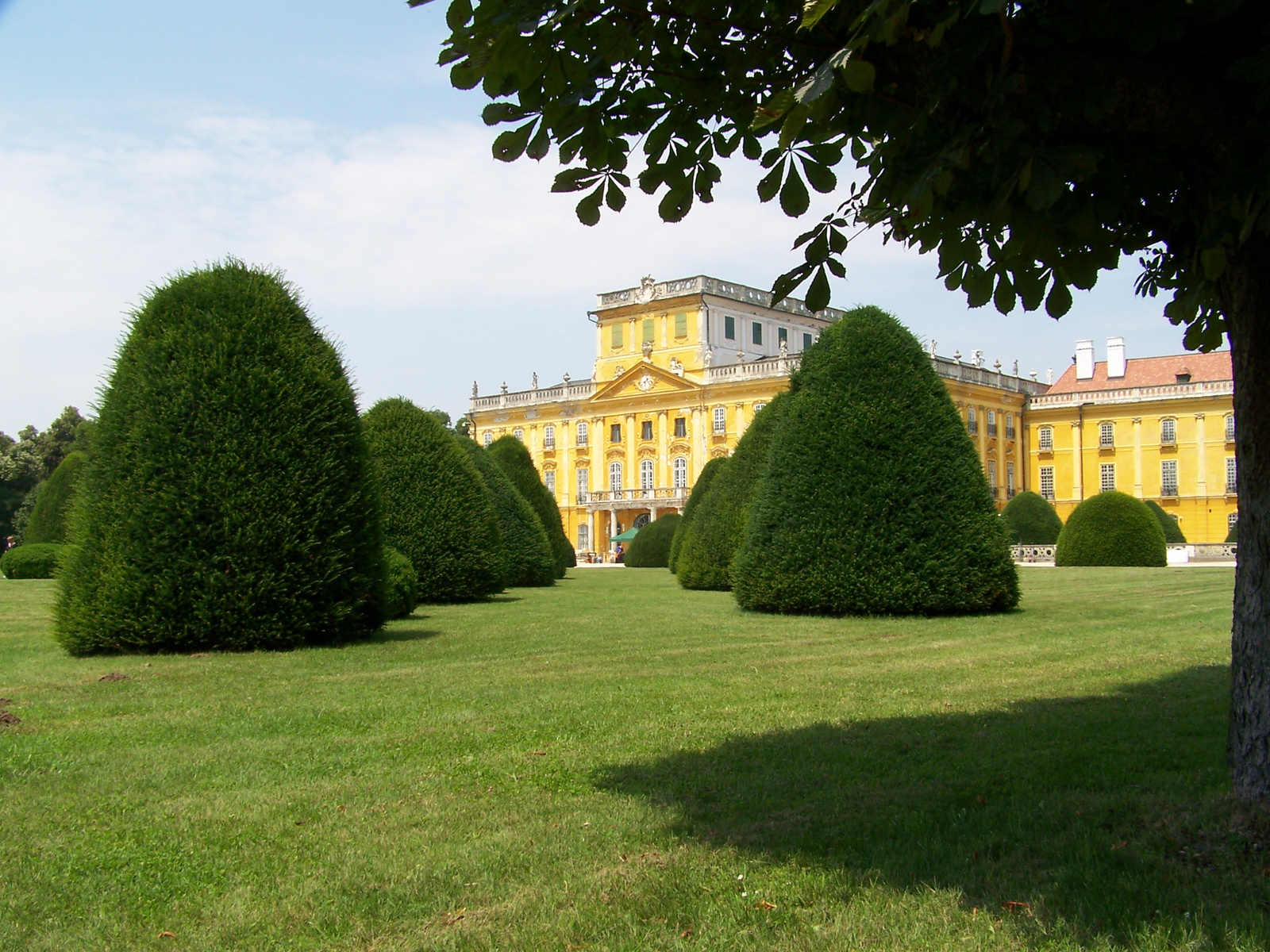 Esterházy-kastély (Fertőd, Madách Imre sétány) This is a photo of a monument in Hungary, Identifier: 4051